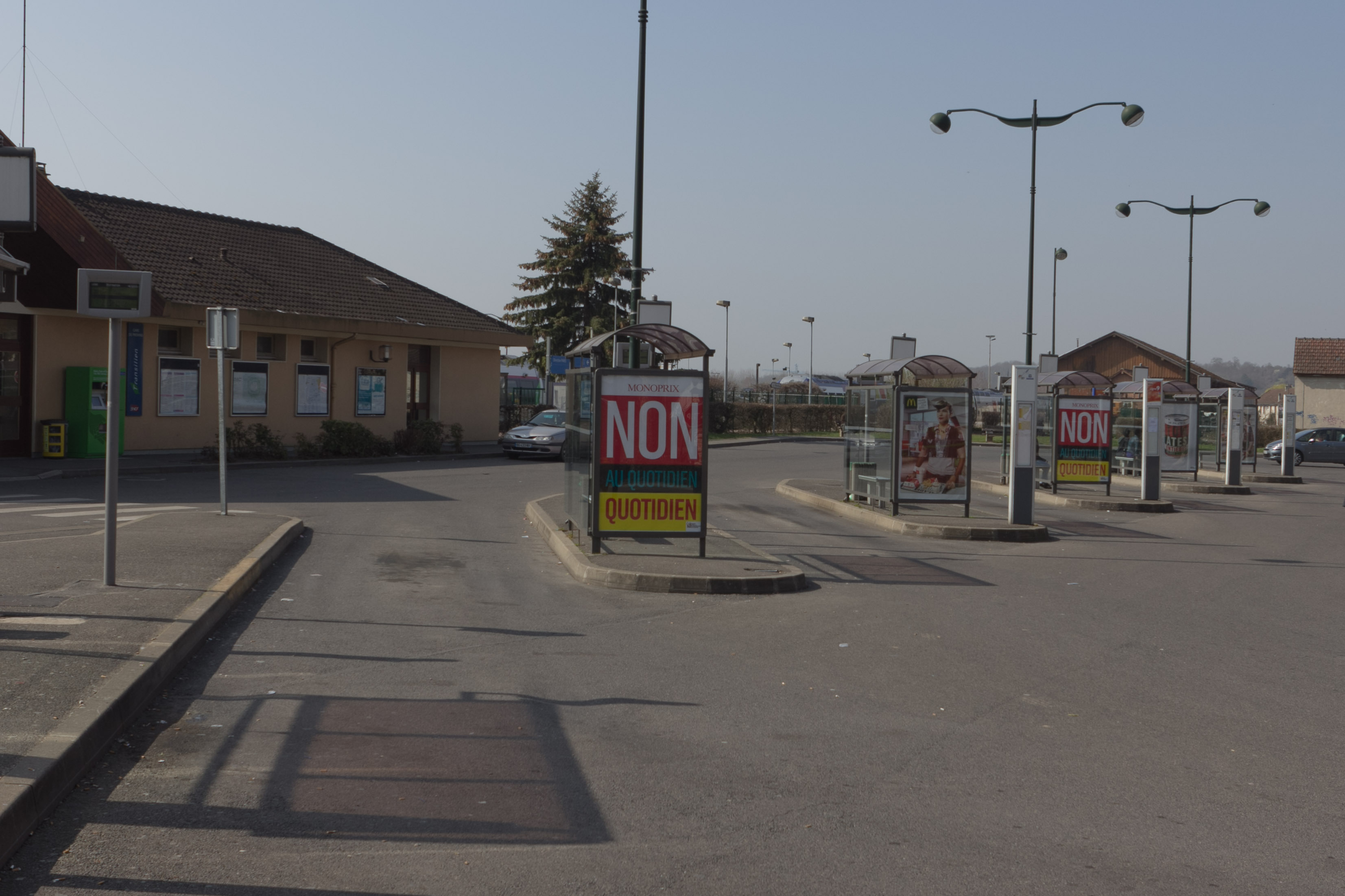 Gare routière de Provins, Provins, département de Seine-et-Marne, France